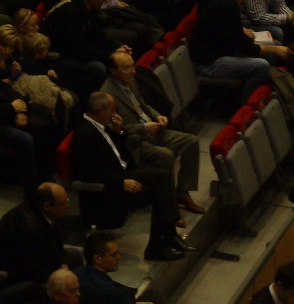 Dominique Juillot, actuel président et Gabriel Bernard, ancien président de l'Elan Chalon. Match de l'Elan Chalon contre Le Mans lors de la saison de Pro A 2010-2011 (19-02-11)